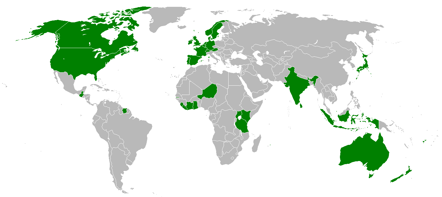 Hadhrat Mirza Tahir Ahmads Auslandsbesuche als Khalifat ul-Massih. Er besuchte folgende Länder: Australien, Belgien, Dänemark, Deutschland, Elfenbenküste, England, Fiji, Frankreich, Gambia, Ghana, Guatemala, Indonesien, Irland, Japan, Kanada, Kenia, Liberia, Luxemburg, Mauritius, Neuseeland, Niederlande, Niger, Norwegen, Österreich, Portugal, Schweden, Schweiz, Sierra Leone, Singapur, Spanien, Sri Lanka, Surinam, Tansania, Uganda und die USA